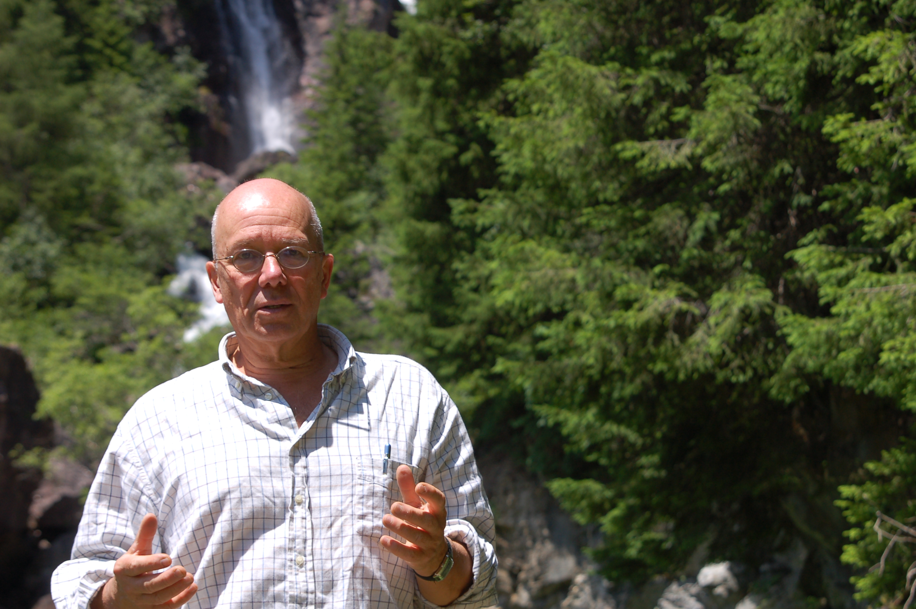 Franco Rocchetta in 2013.